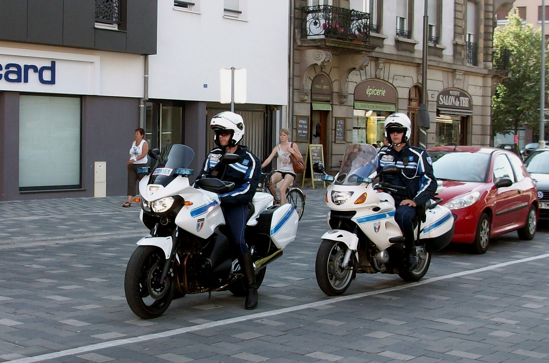 Policiers municipaux sur des motos à Strasbourg.